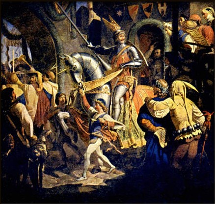 Karel Svoboda (1824-1870) - Král Václav I. vjíždí v plné zbroji na turnaj